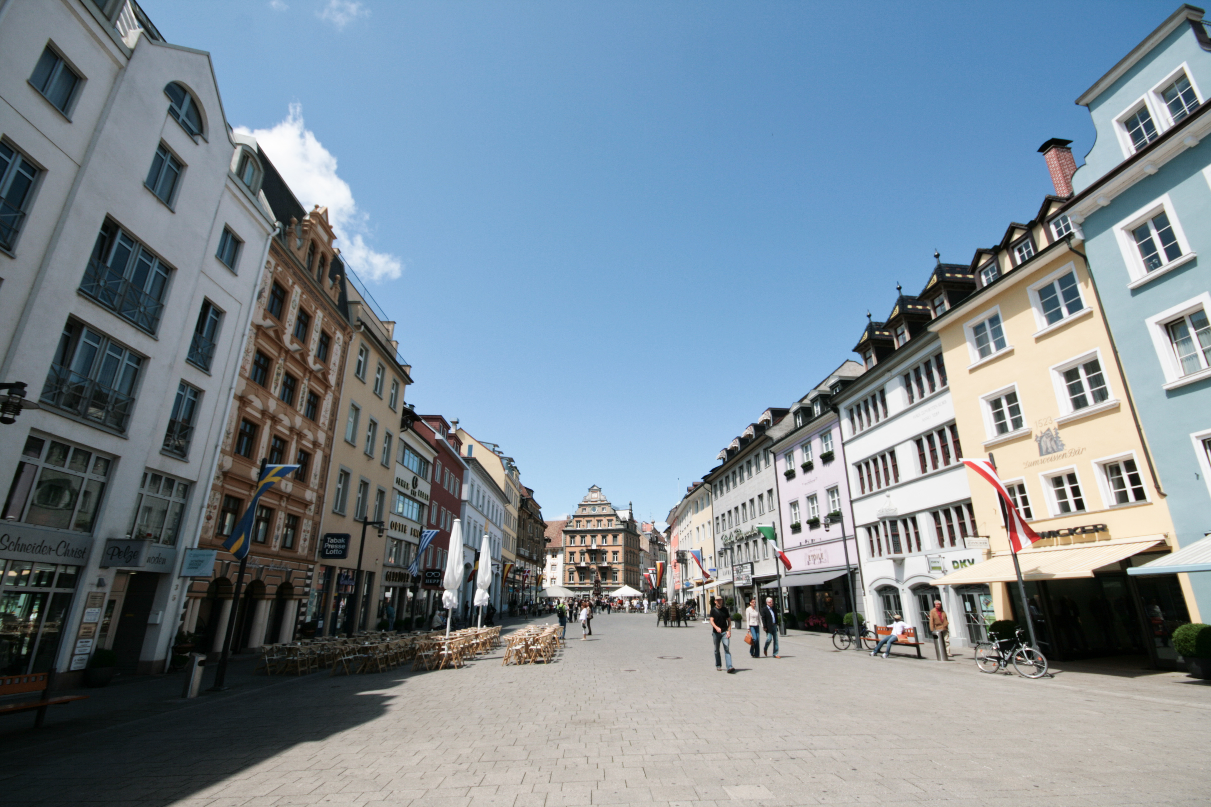 Marktstätte in Konstanz, aufgenommen im Juni 2009